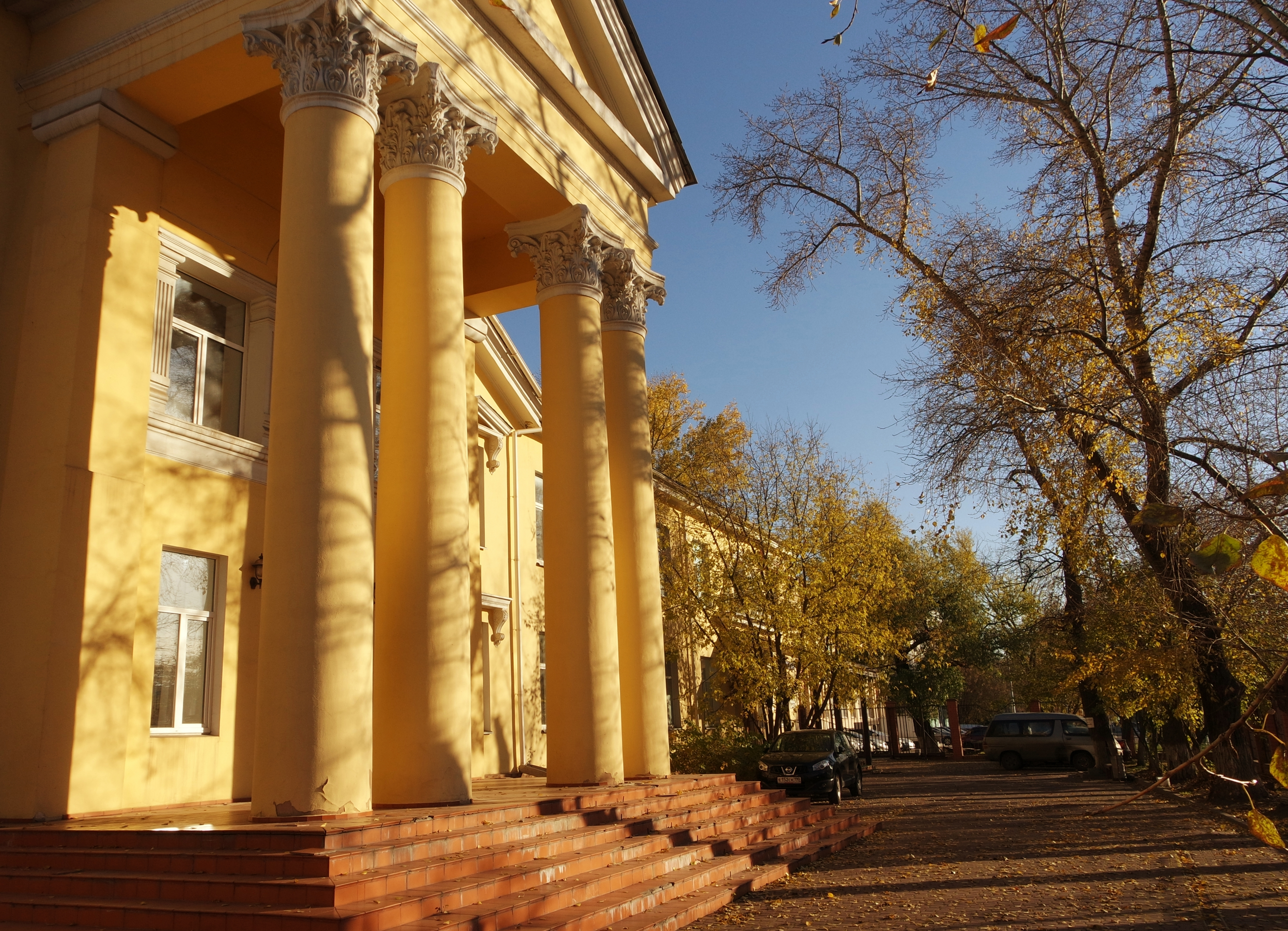 Бывшая медсанчасть завода «Борец»